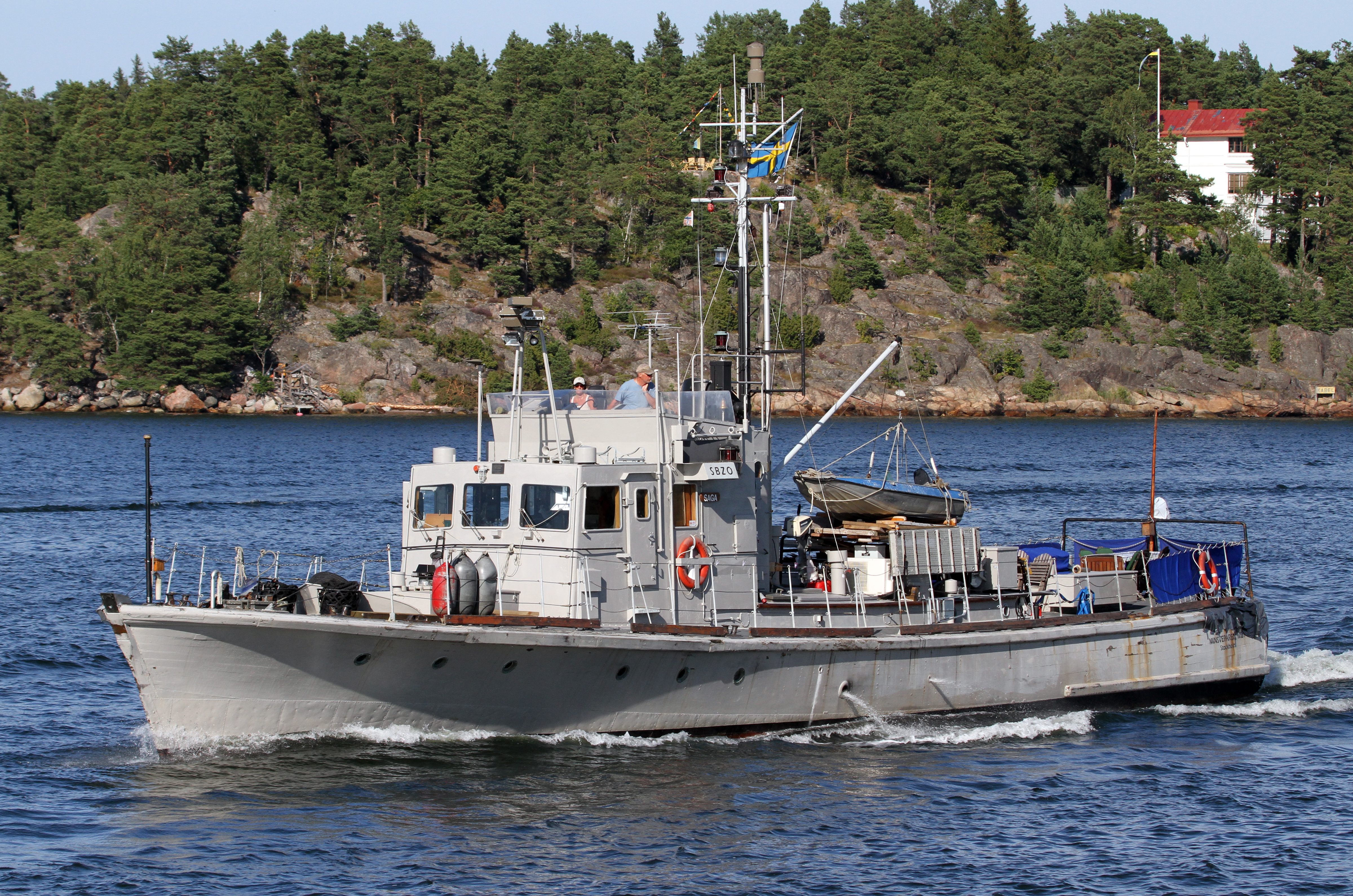 M21 Saga i Lindalssundet, Värmdö 4 augusti 2015